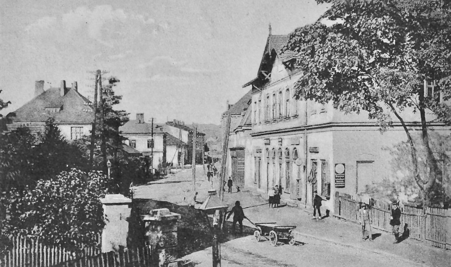 Ulica Główna w Zabłociu (obecnie Dworcowa) na początku XX wieku